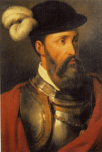 Francisco Pizarro, conqueror of Incas Empire